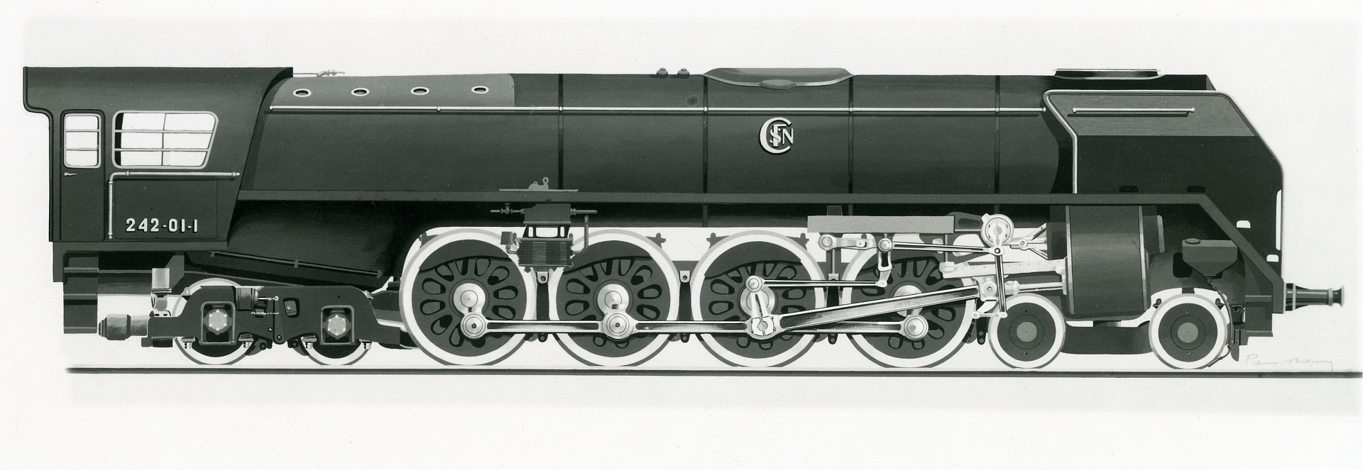 Dessin d'époque de la locomotive 242 étudiée par la DEL.